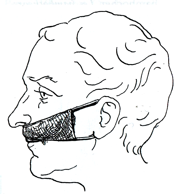 La bigotelle sur un dessin du XIXe siècle.